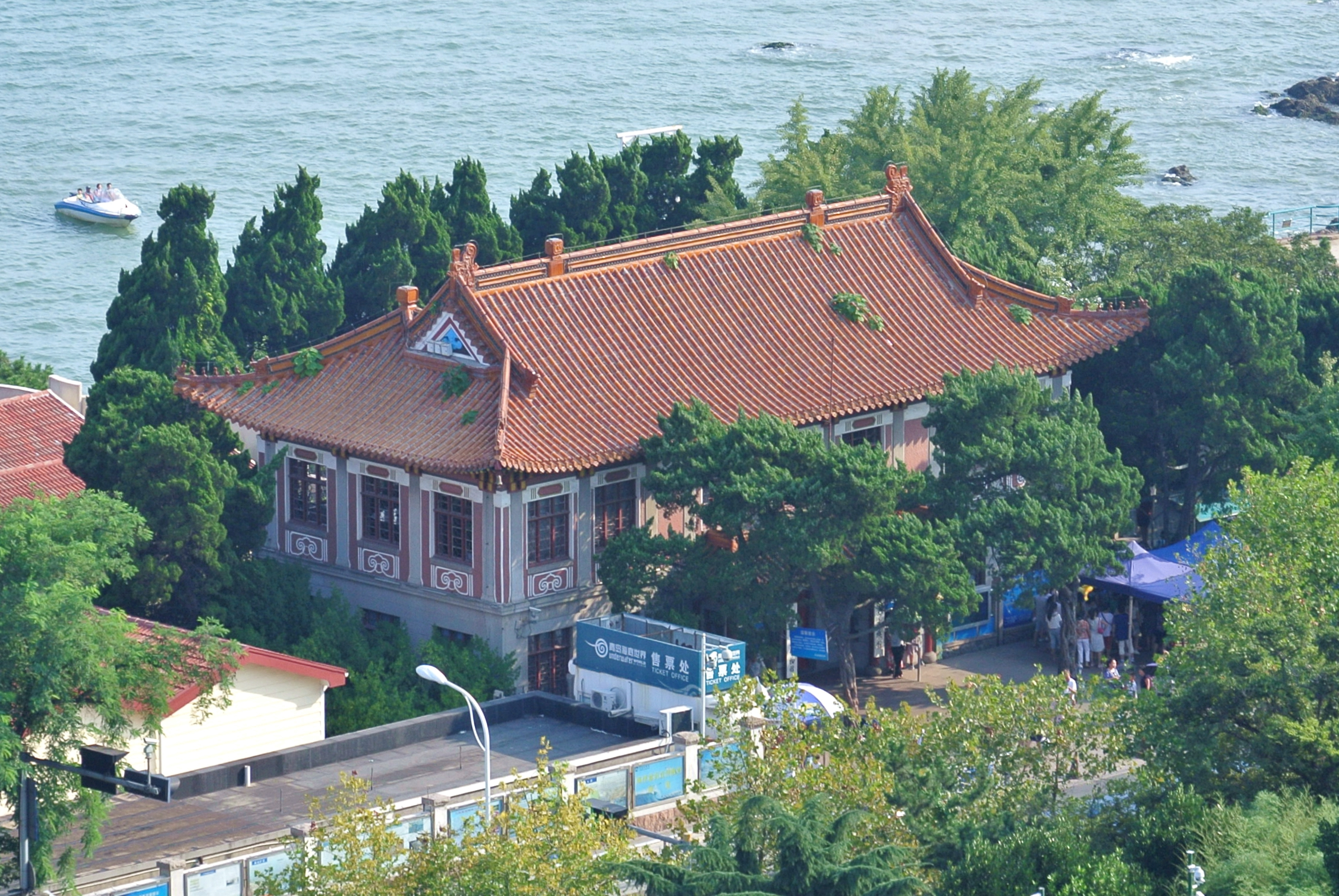 青岛海滨生物研究所旧址